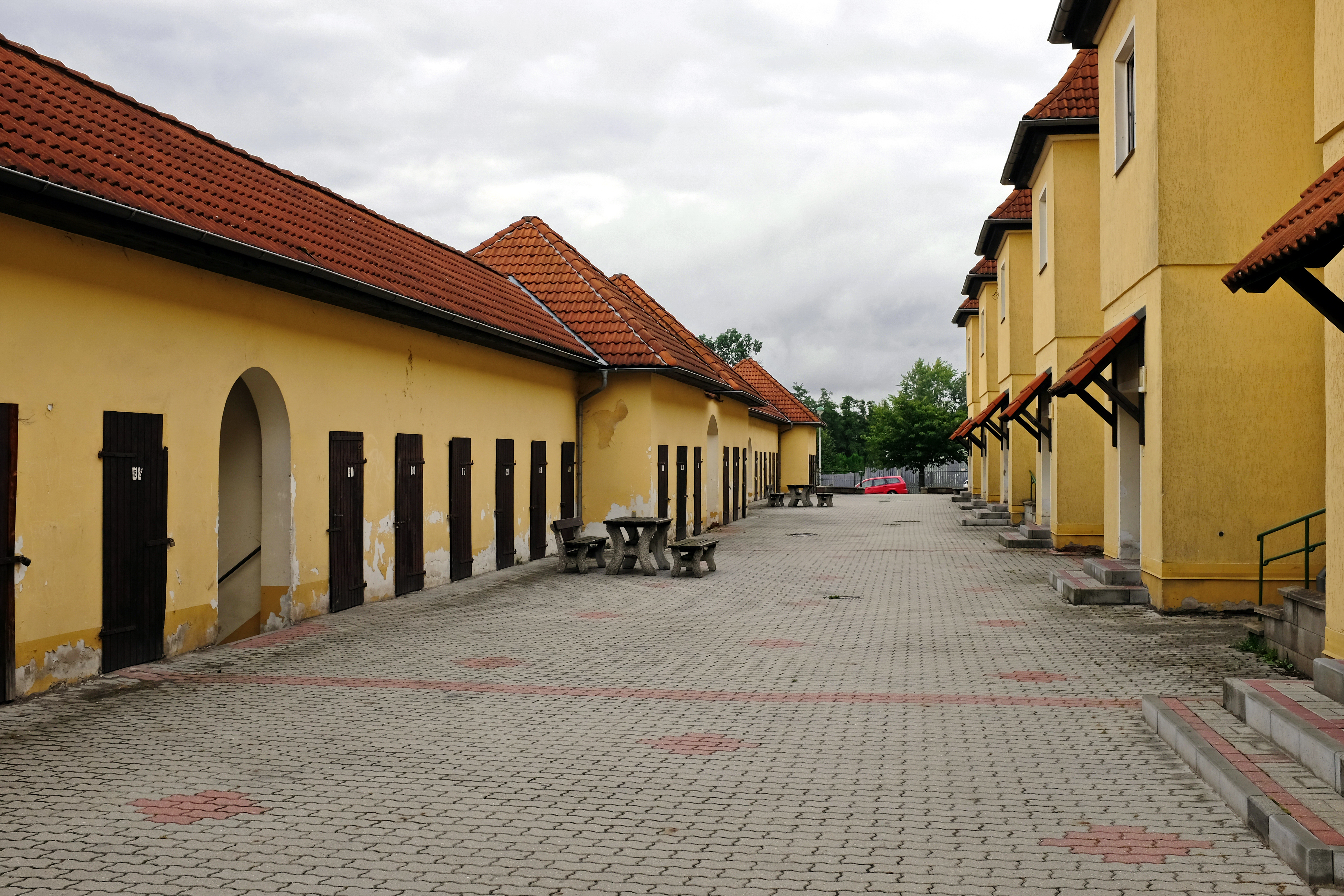 Královské Poříčí, bývalá hornická kolonie okres Sokolov